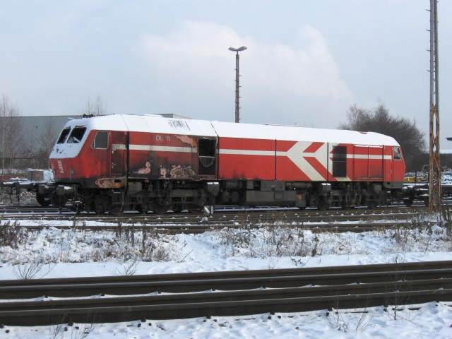 HGK DE 11 (MAK DE 1024, ex DB Baureihe 240) ausgebrannt abgestellt im HGK-Betriebswerk Brühl